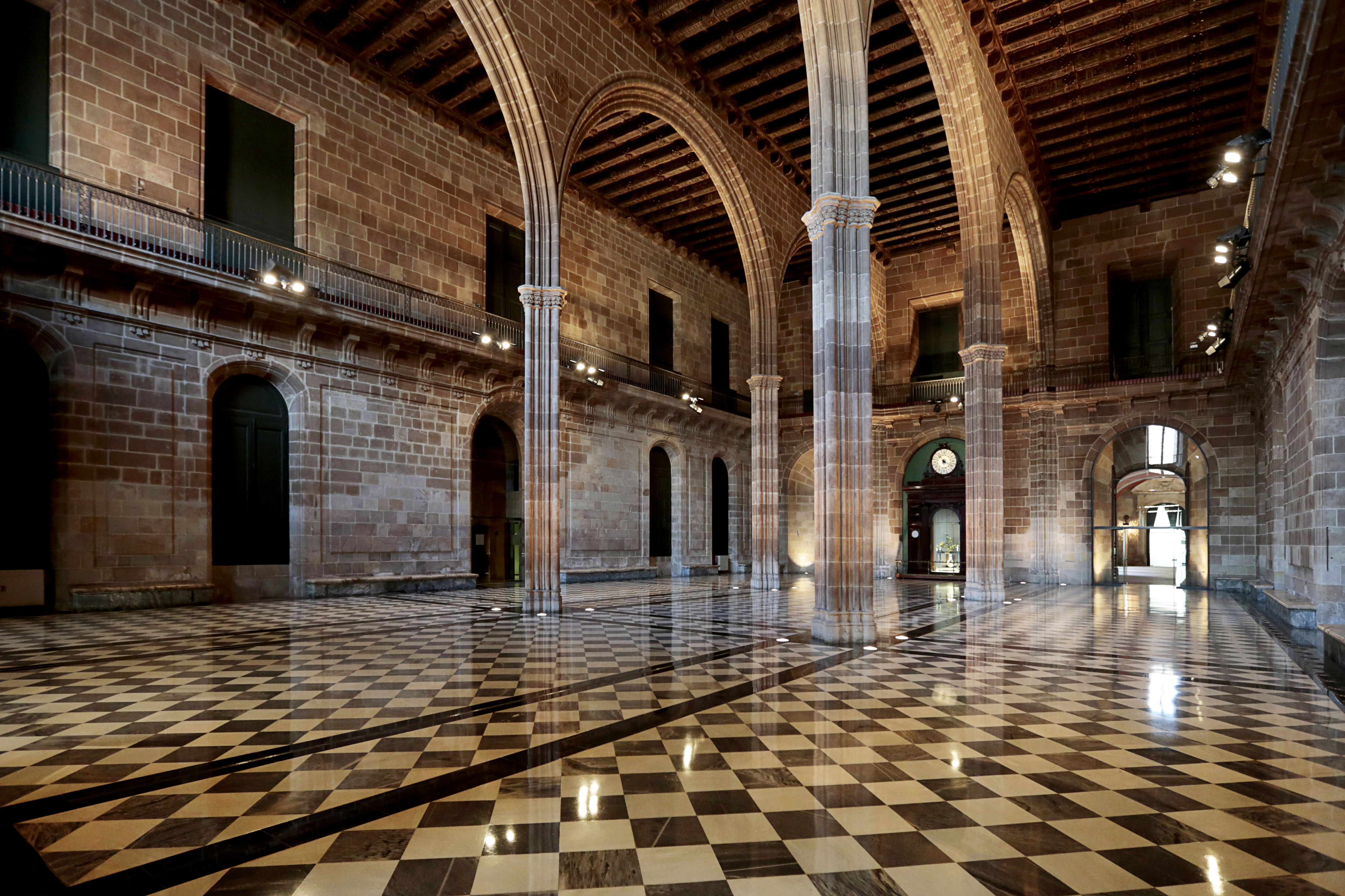 El Saló de Contractacions és la peça arquitectònica més destacada de la Casa Llotja de Mar, ja que es conserva des del període medieval. És una gran sala de 14 metres d'alçada, amb quatre columnes i sis arcs que sostenen els forjats de fusta del pis superior. A les petxines dels arcs s'alternen els escuts del rei i de la ciutat de Barcelona, ja que van ser Pere III i el Consell de Cent els qui van impulsar la construcció de l'edifici. Aquest saló ha estat testimoni de la primera òpera representada a Barcelona, dels Jocs Florals i d'altres esdeveniments culturals.